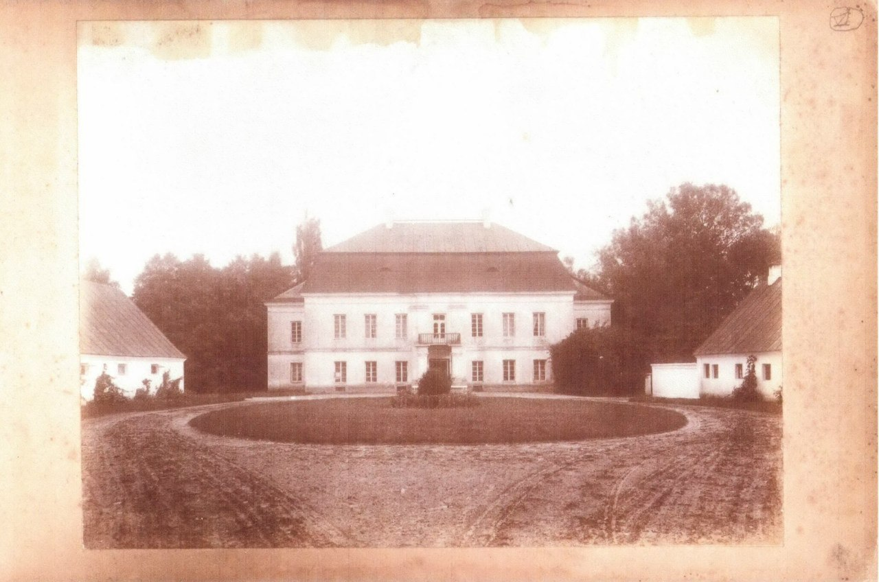 Беларуская (тарашкевіца): Скокі (Skoki), сядзіба Нямцэвічаў (Niamcevič)